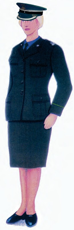 Ubiór wyjściowy funkcjonariuszy noszących umundurowanie SP z mundurem wyjściowym noszonym ze spódnicą z czapką garnizonową.